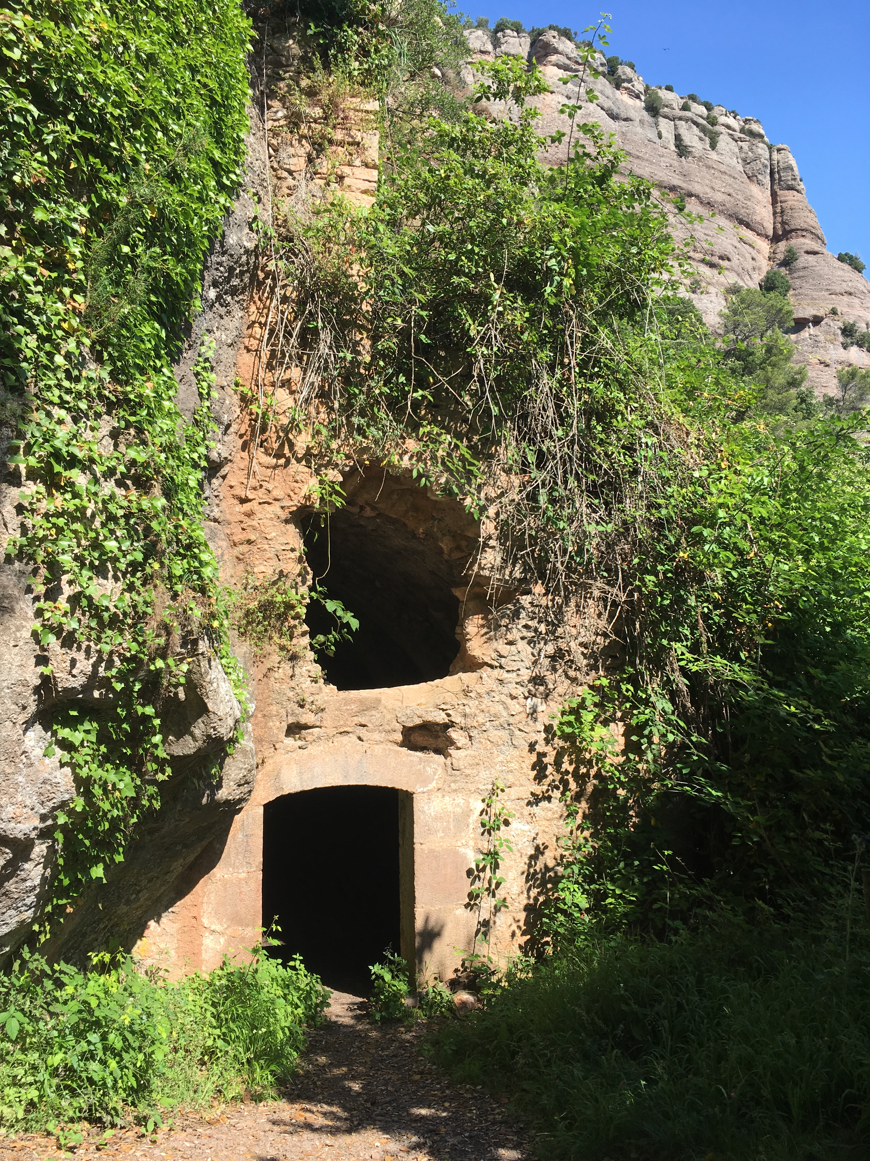 Ermita de Santa Agès. Sant LLorenç del Munt